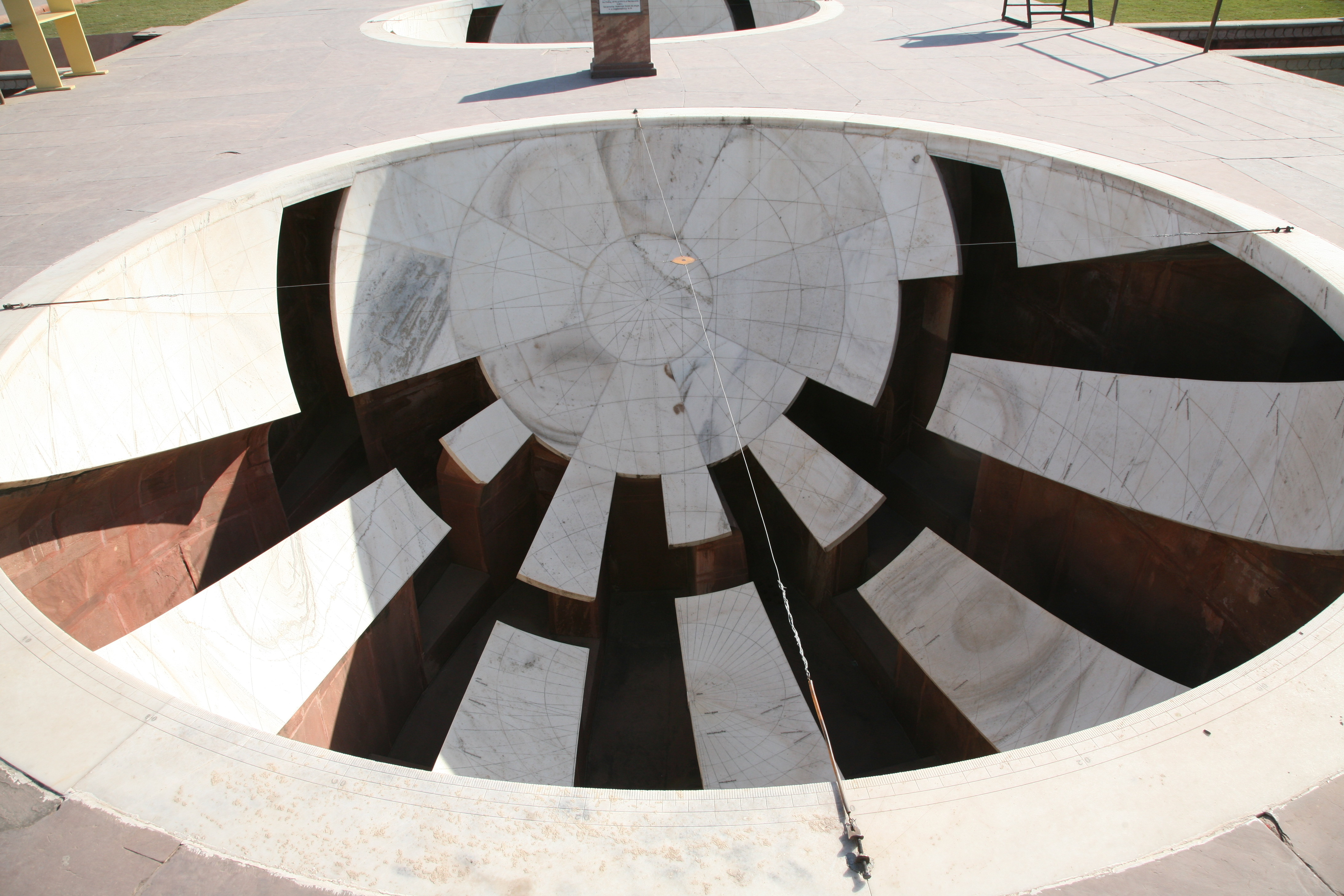 From Jantar Mantar in Jaipur.